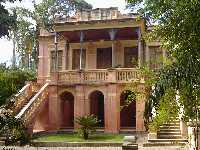 Solar dos Ferraz Costa - Itatiba